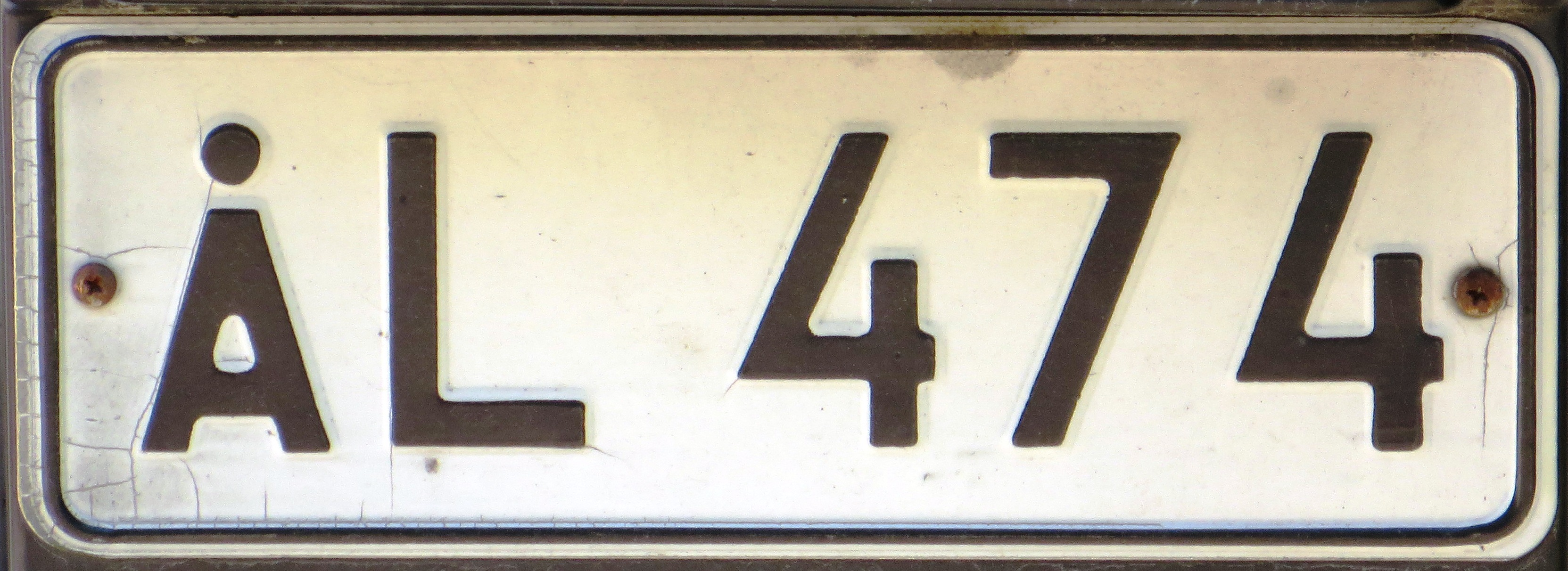 Åland kentekenplaat